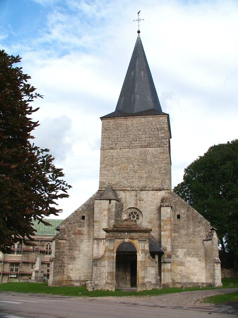 Eglise de Damvillers (Meuse) Photo prise en automne 2005 par F5ZV Licensing Catégorie:Image de commune de la Meuse